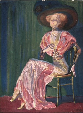 Künstler-Ansichtskarte G. Hirth`s Verlag Serie XVII, 2: Jugend, Gussy Holl, Portrait der Schauspielerin, gelaufen 1918